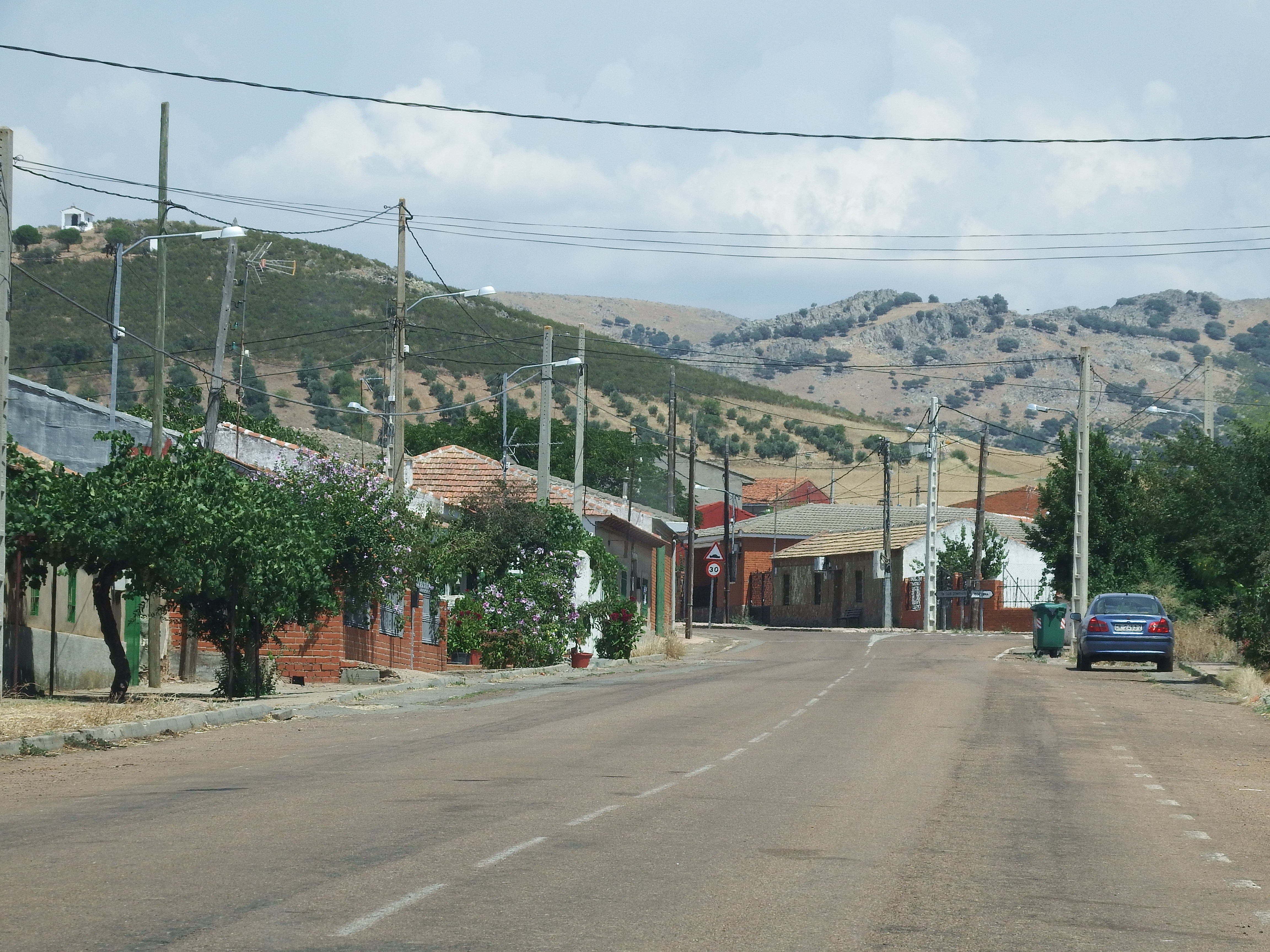 El Trincheto, Porzuna